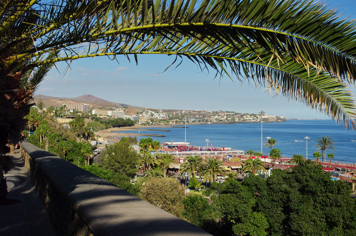 Playa del Inglés nach Osten, Costa Canaria